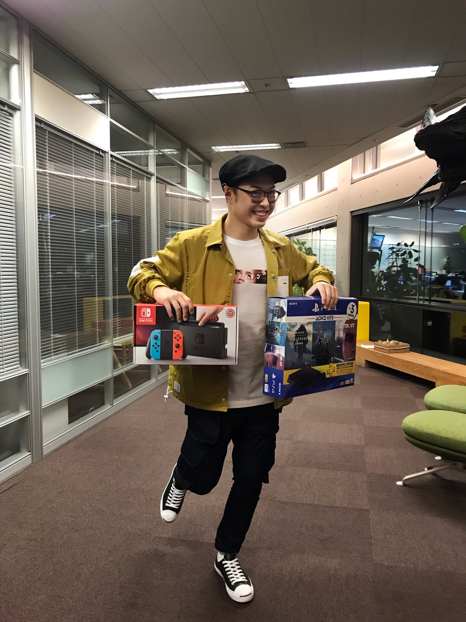 大學生了沒high咖邱志恒